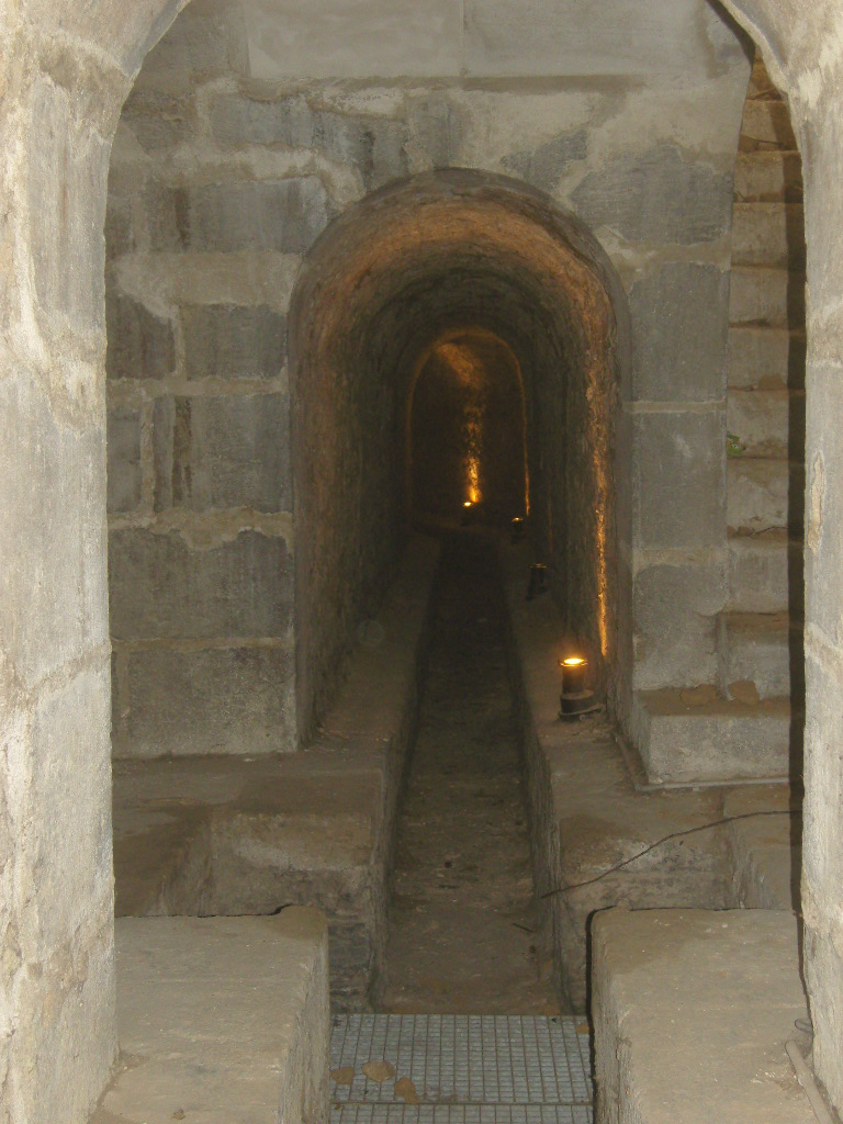 Paris 14e arrondissement, rue de l'Empereur-Valentinien, restes de l'aqueduc Médicis mis à jour lors des travaux d'aménagement de la ZAC Alésia-Montsouris.